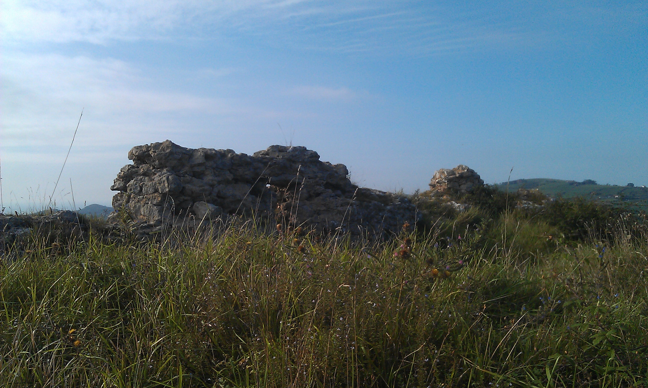 Lienzo de muralla de las ruinas del castillo o torre de Vispieres, en el monte del mismo nombre, municipio de Santillana del Mar, Cantabria, España.